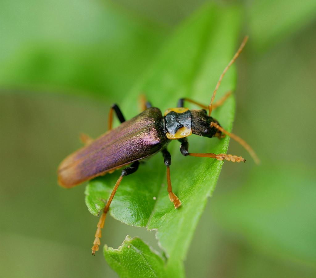 2019/06/12 和歌山県田辺市：Tanabe City. Wakayama Pref. Japan